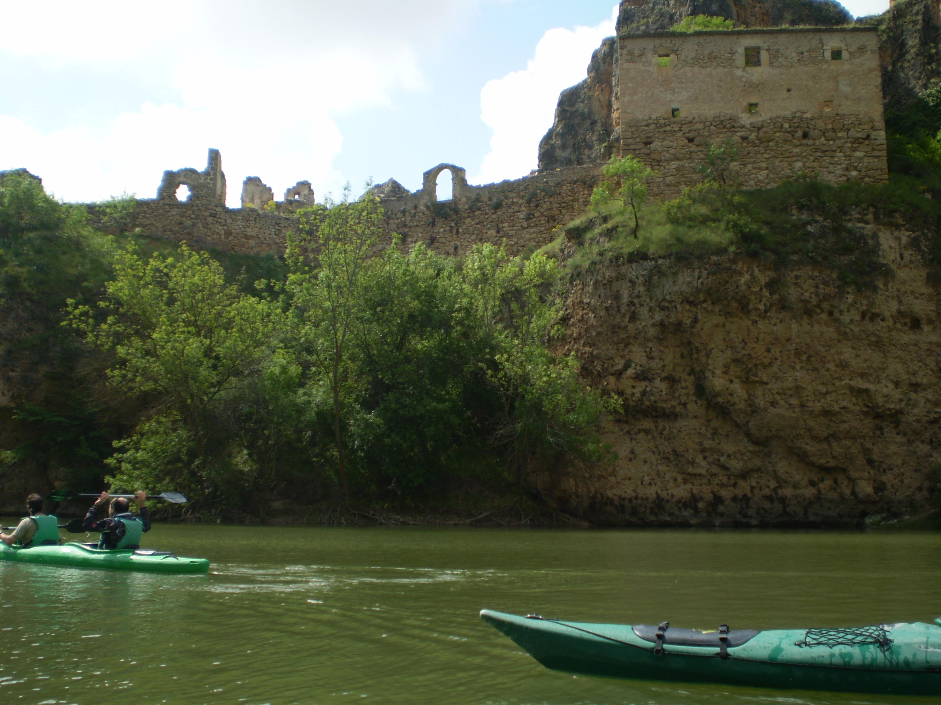 Monasterio de nuestra señora de la hoz en el Parque Natural de las Hoces del Río Duratón (Segovia, España).